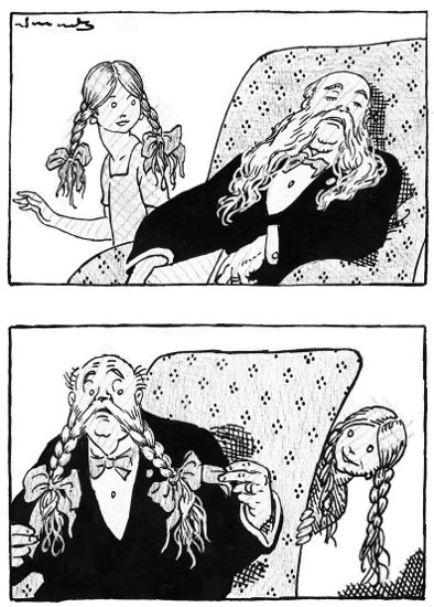 Acudit